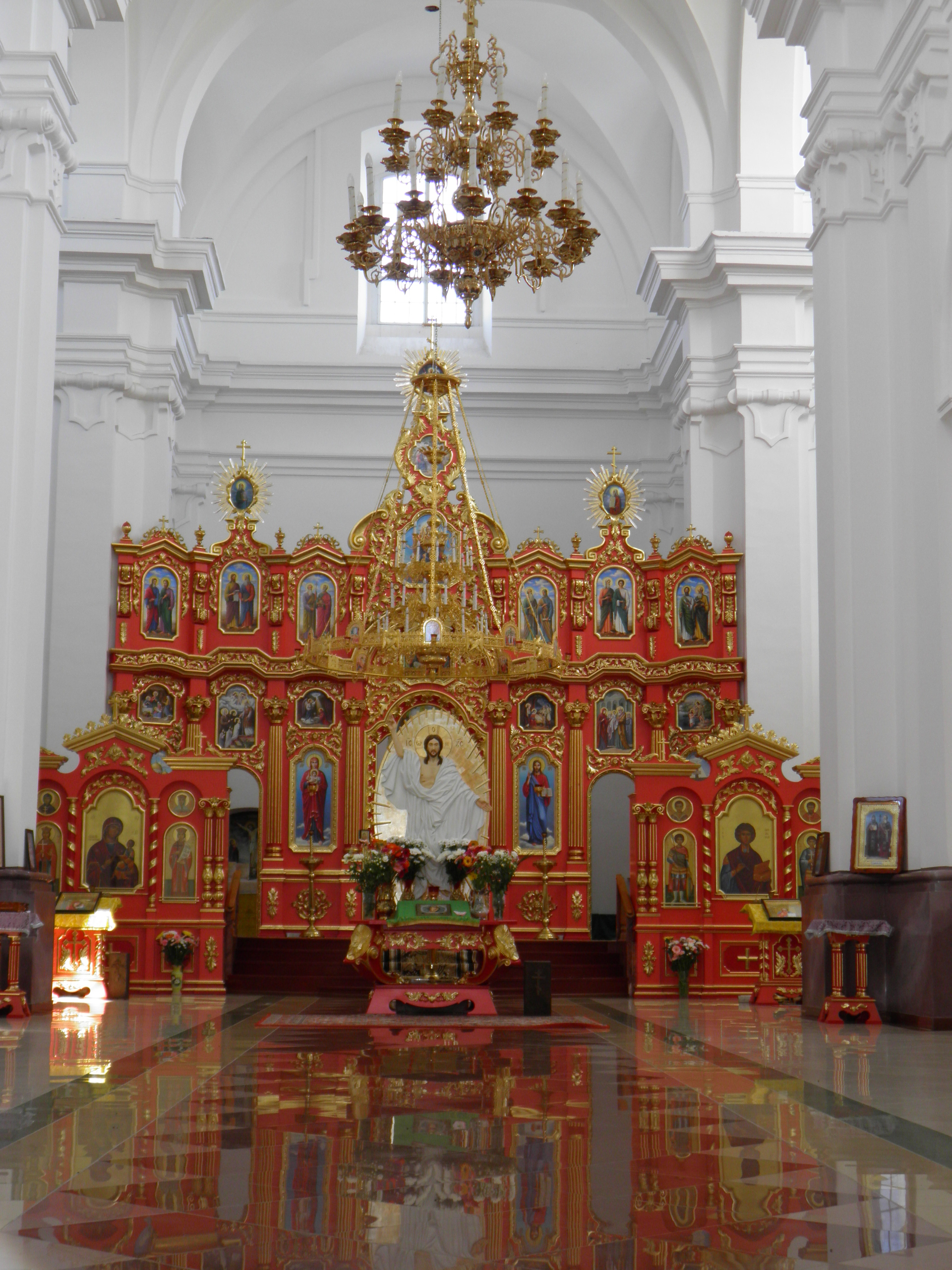 Ст. Чарторийськ. Вівтар у монастирській церкві.